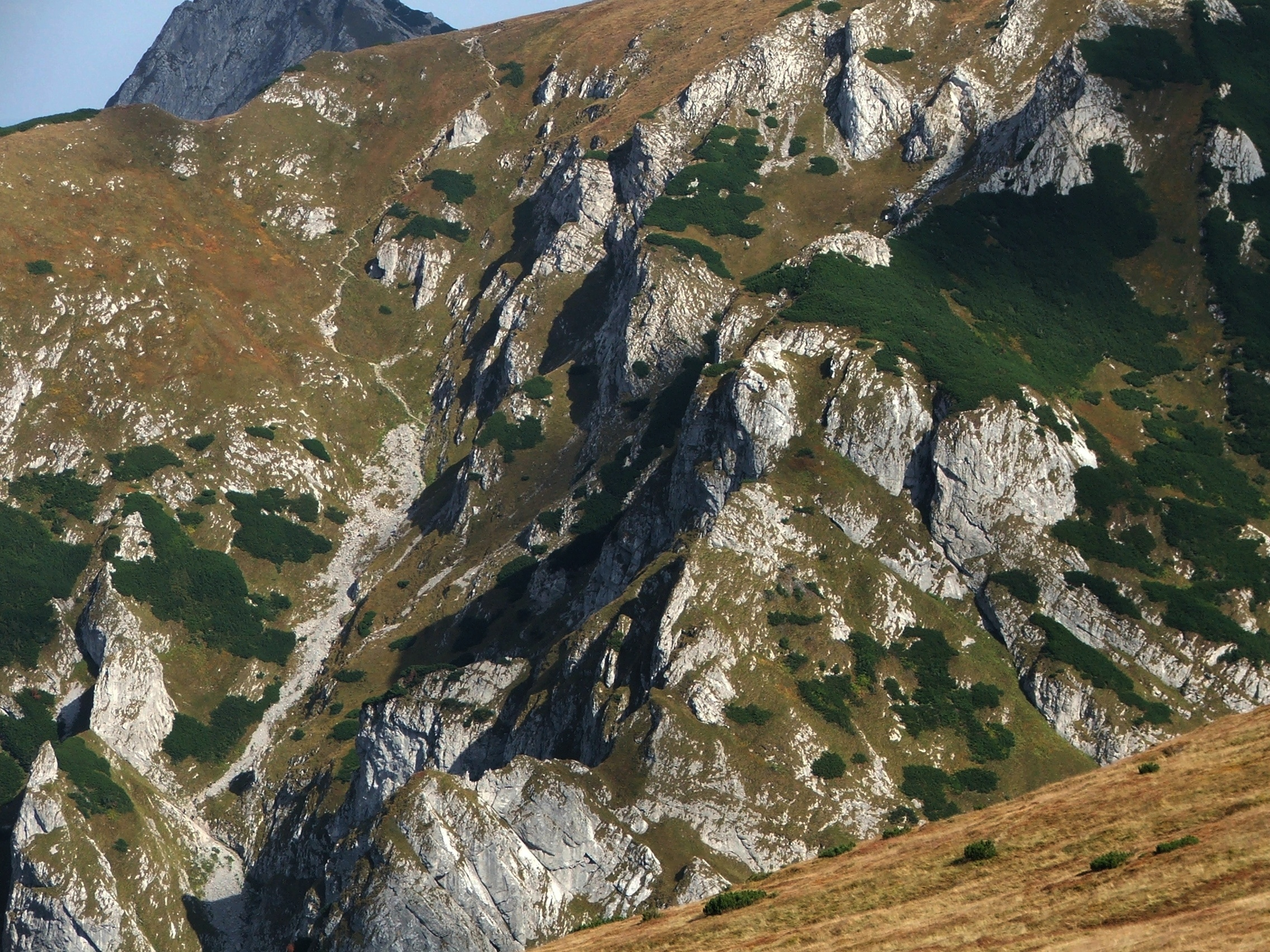 Widok z okolic Pieca